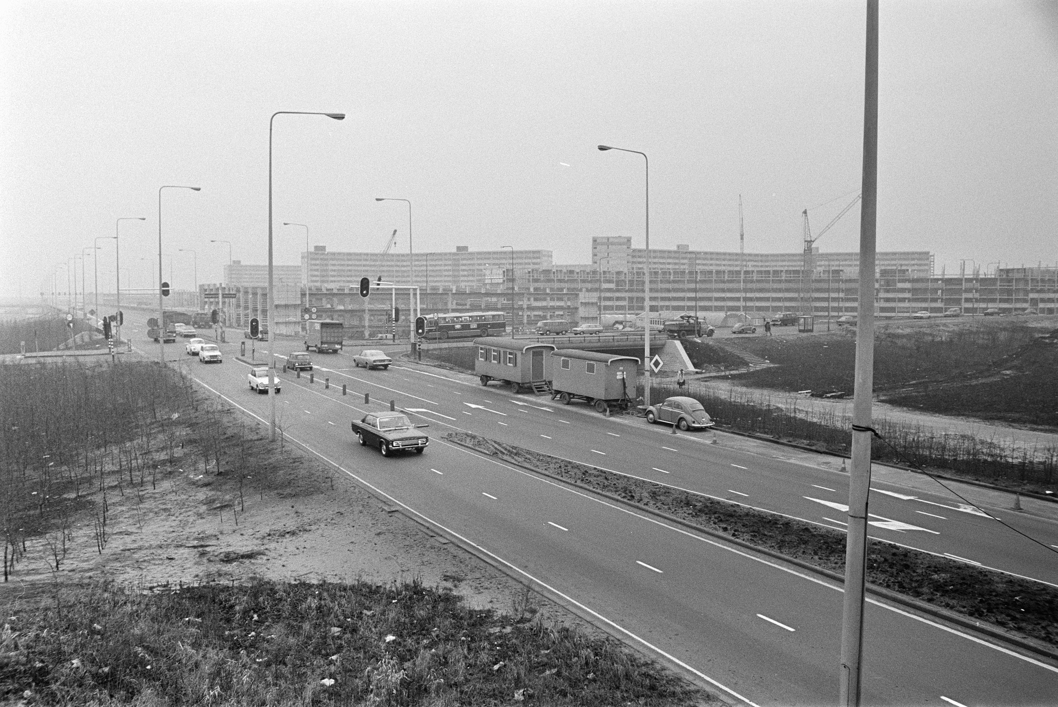 Collectie / Archief : Fotocollectie Anefo Reportage / Serie : [ onbekend ] Beschrijving : Bijlmermeer, Amsterdam Datum : 9 februari 1971 Locatie : Amsterdam, Noord-Holland Fotograaf : Mieremet, Rob / Anefo Auteursrechthebbende : Nationaal Archief Materiaalsoort : Negatief (zwart/wit) Nummer archiefinventaris : bekijk toegang 2.24.01.05 Bestanddeelnummer : 924-2522 Reacties Geplaatst door O. Steensma op 24 september 2015 - 13:45. Bijlmerdreef, ter hoogte van de gelijkvloerse kruising met de Gooische hulpweg. Op de achtergrond de bouw van deel B (Florijn, Fleerde en Frissenstein)